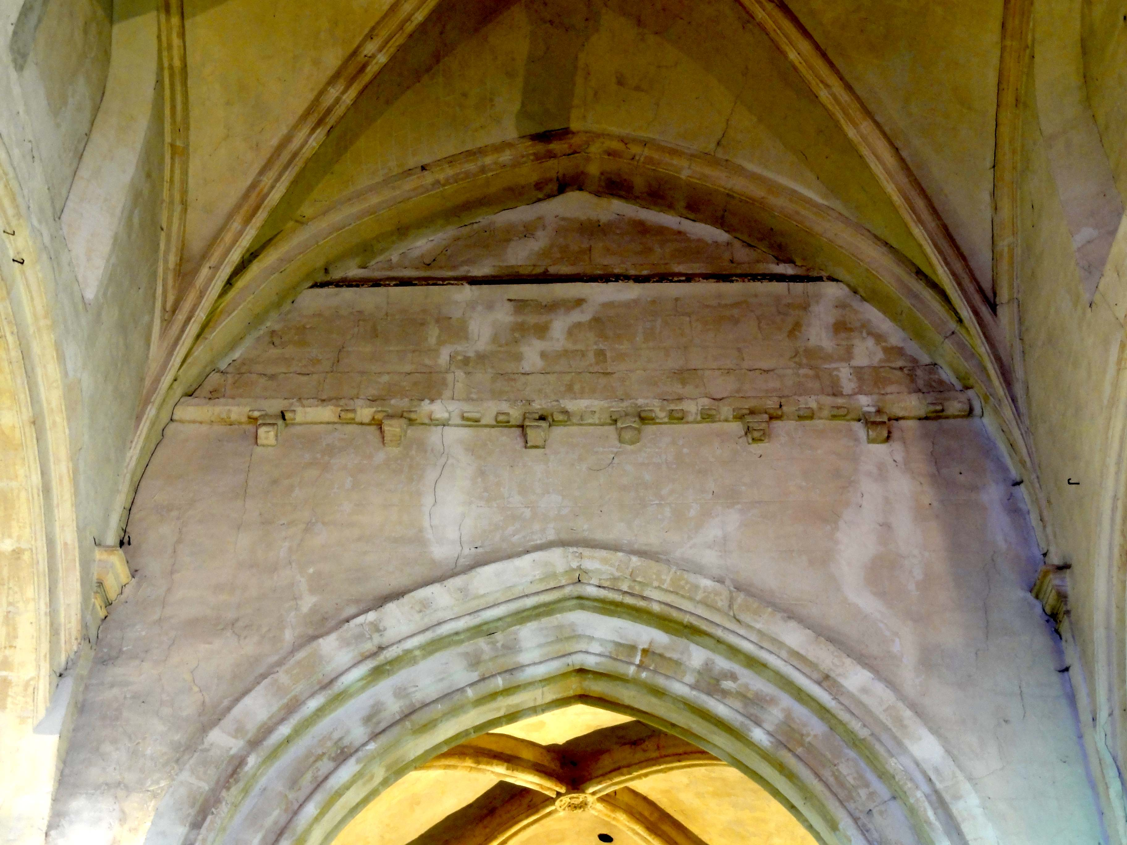 Chœur, extrémité occidentale (ancienne corniche du clocher).